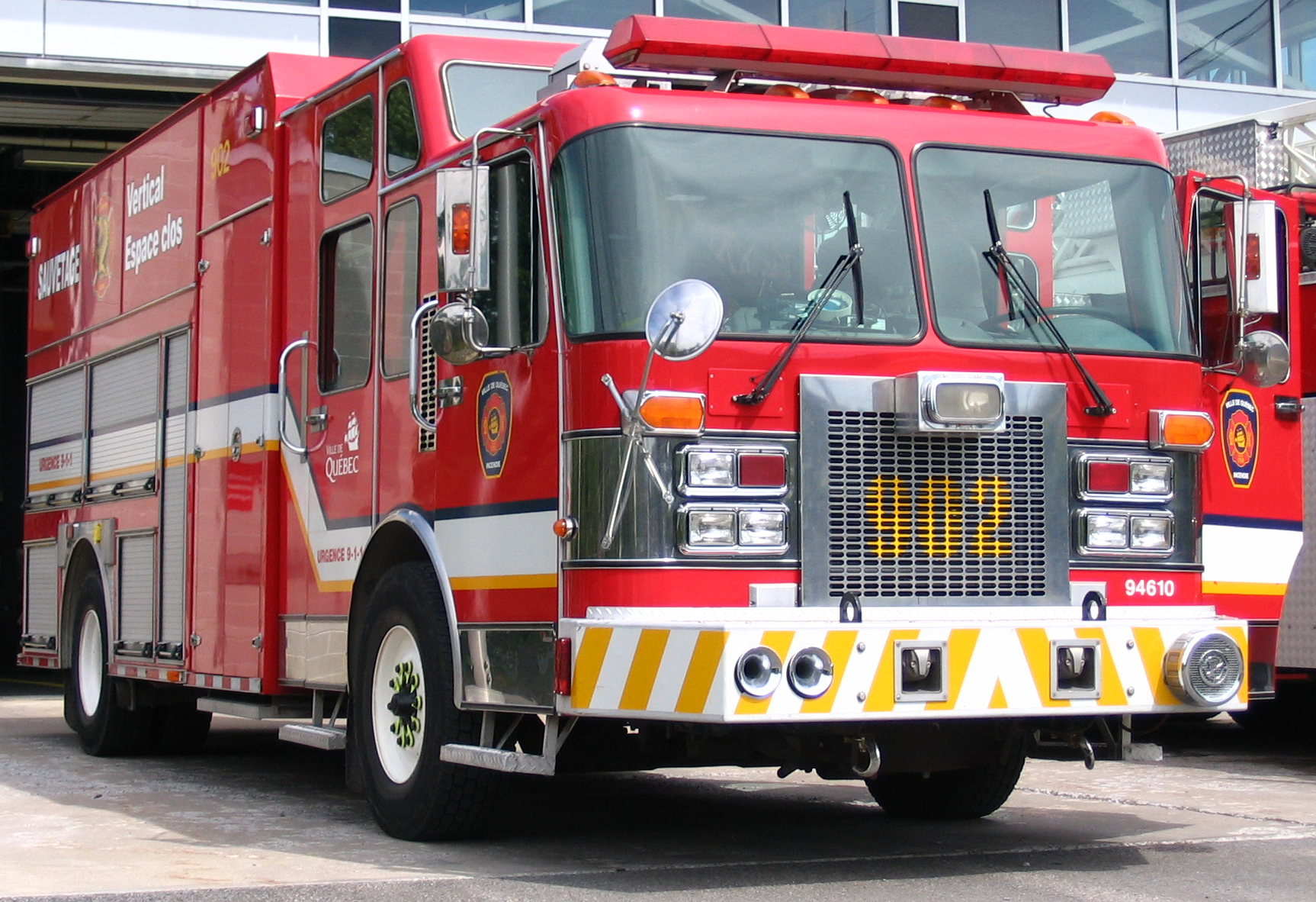 Camion du service de protection contre l'incendie de la ville de Québec, à la caserne du boulevard des Capucins.